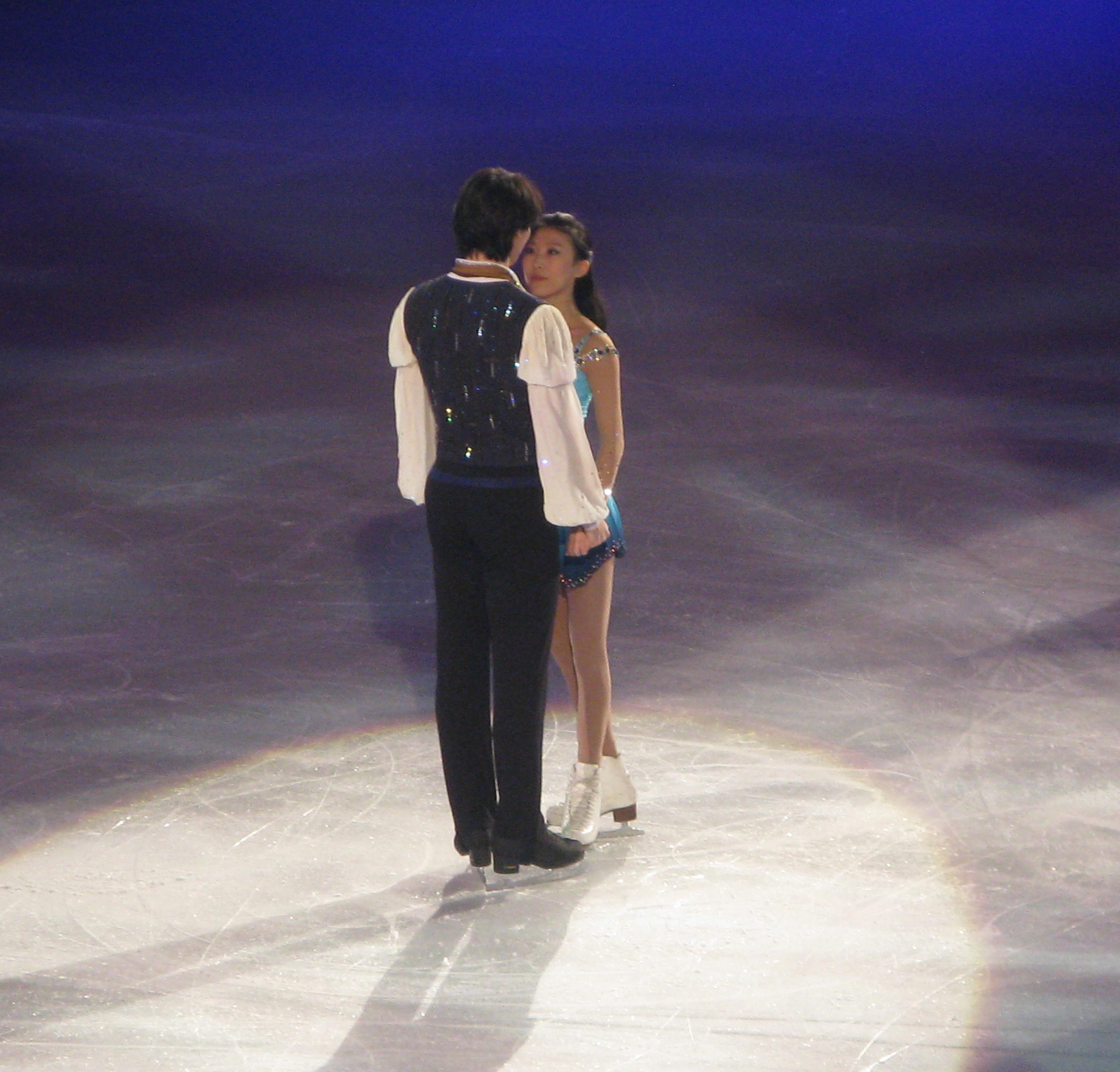 Pang Qing et Tong Jian lors du gala du trophée Éric Bompard 2013 à Paris-Bercy.